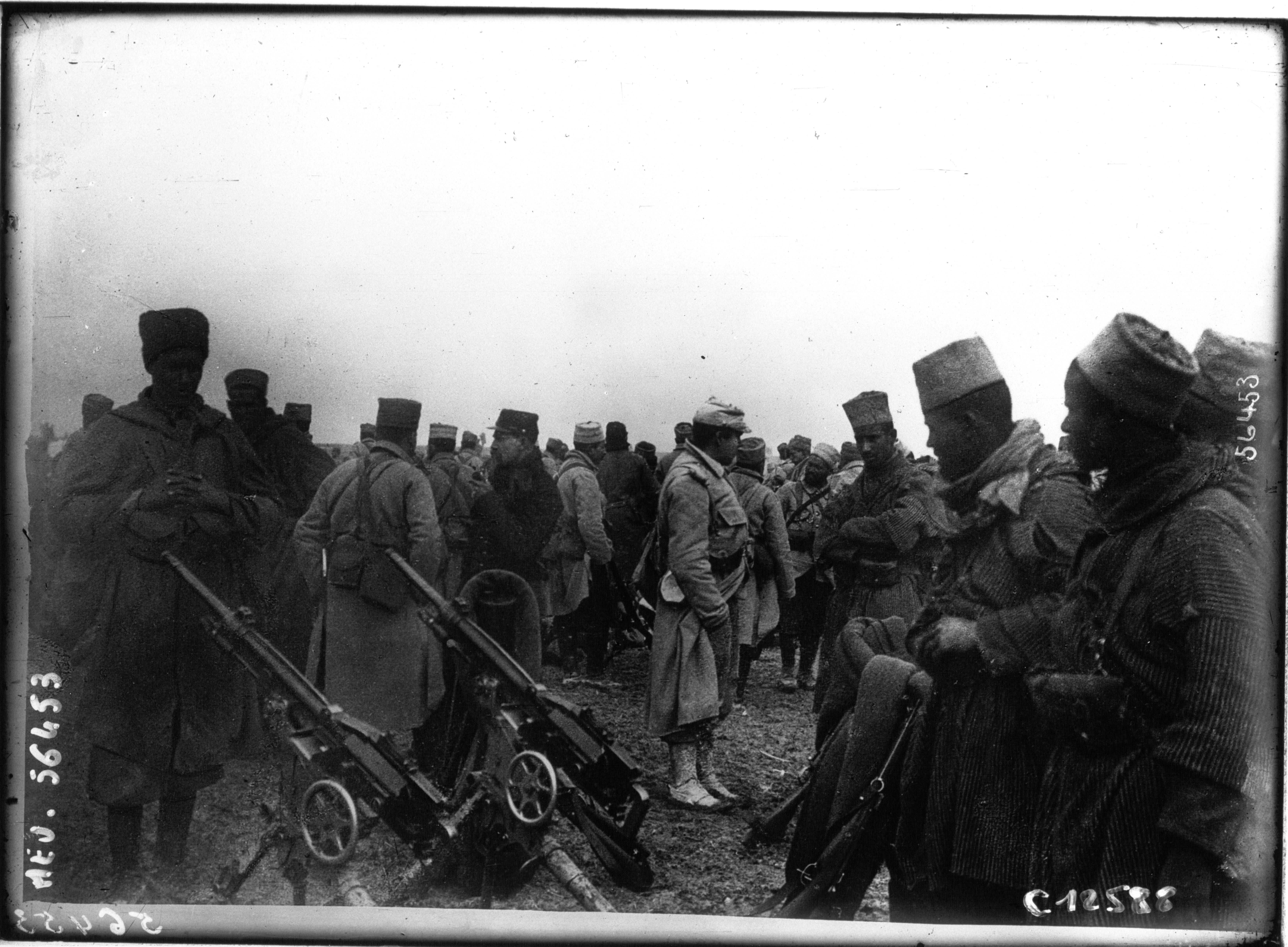 Tirailleurs marocains et algériens au retour des tranchées